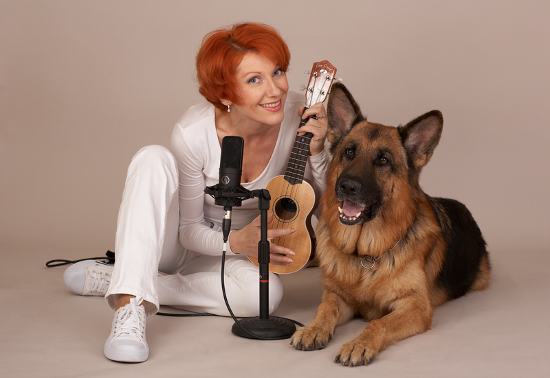 Заслуженная актриса России Оксана Сташенко с Мухтаром